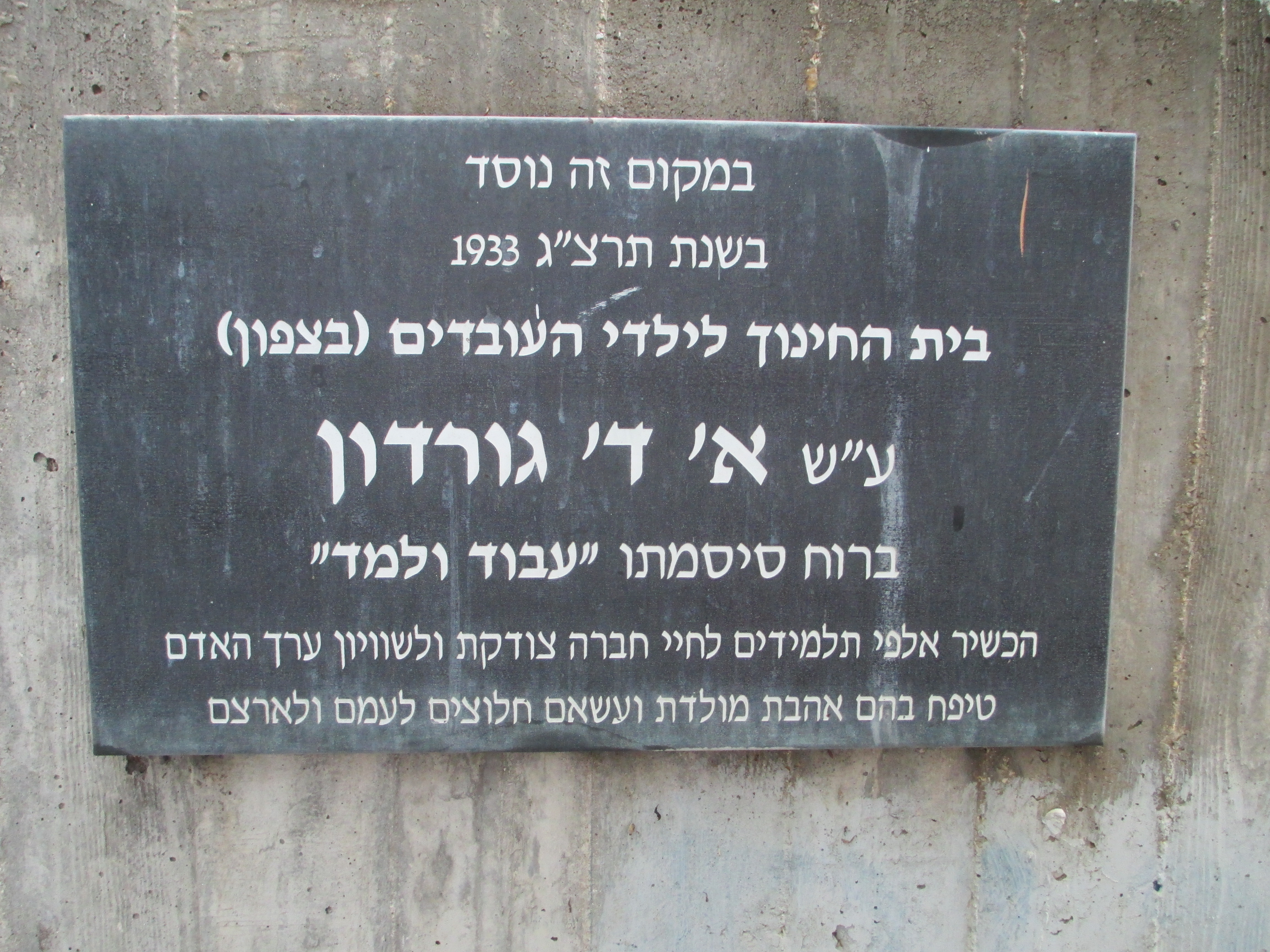 לוחית זיכרון לבית הספר א.ד. גורדון בתל אביב